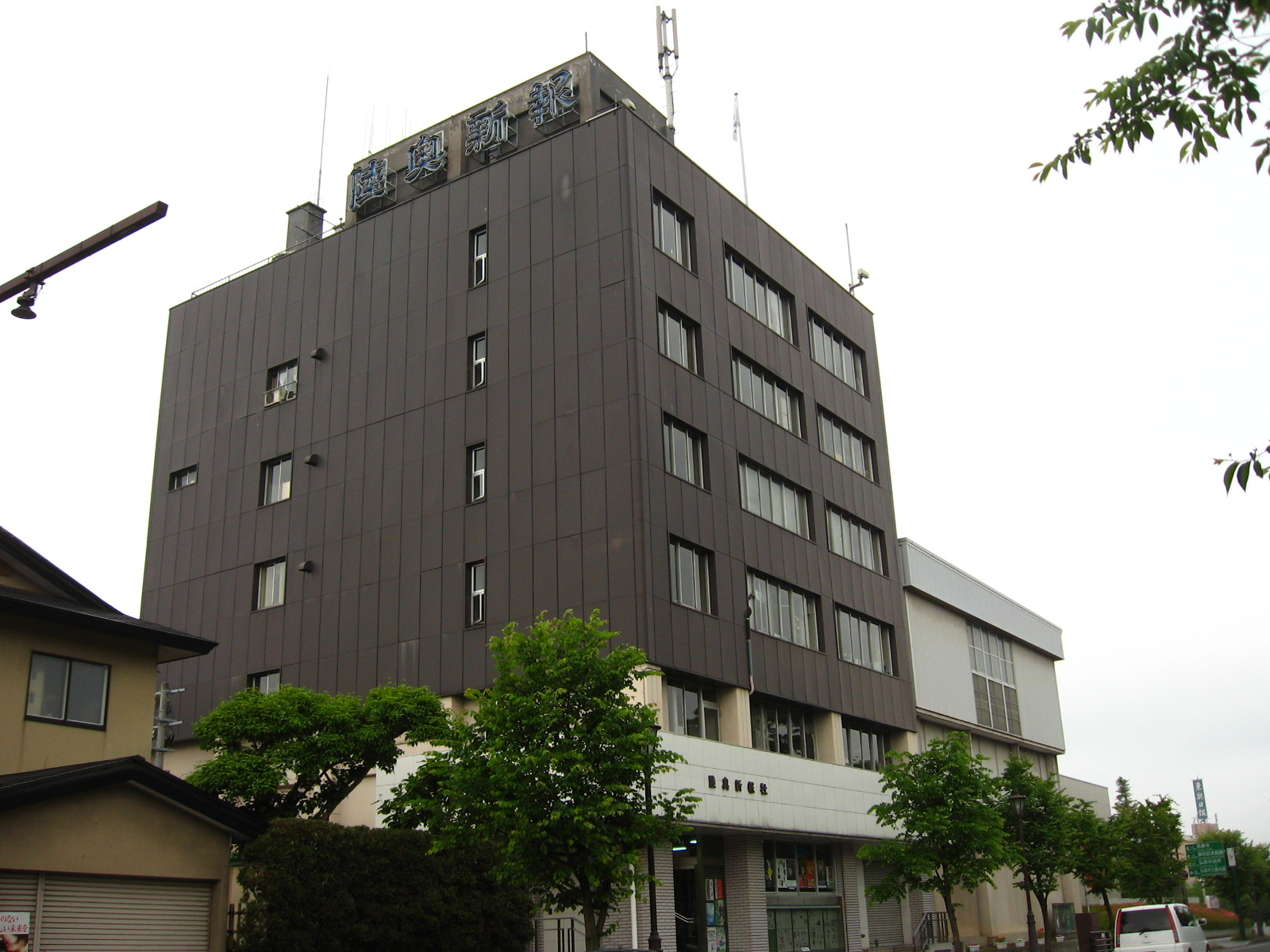 陸奥新報社（青森県弘前市）